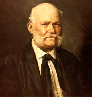 Karl Ernst Papf, self-portrait